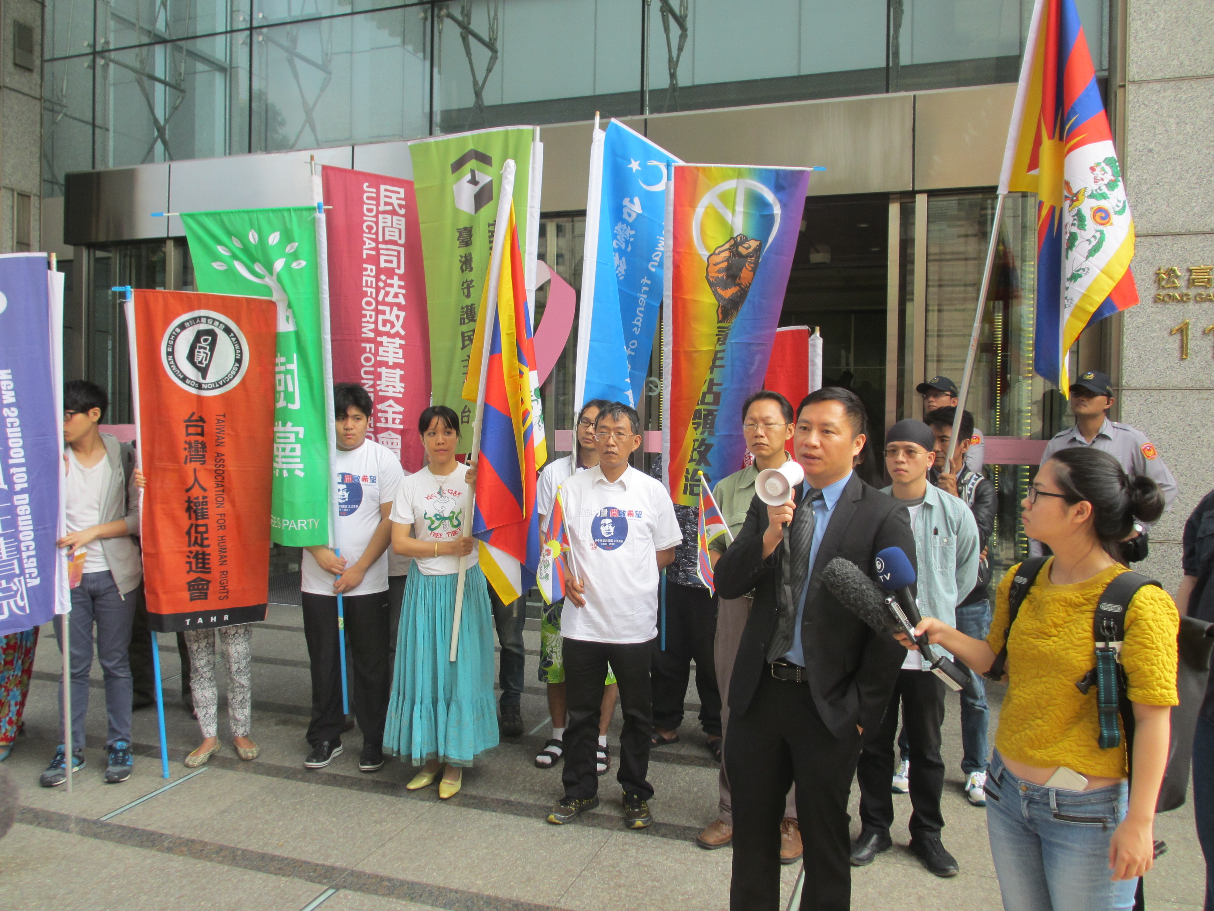 中文（台灣）: 台灣公民團體前往英國駐台代表處抗議（美國之音張永泰拍攝）